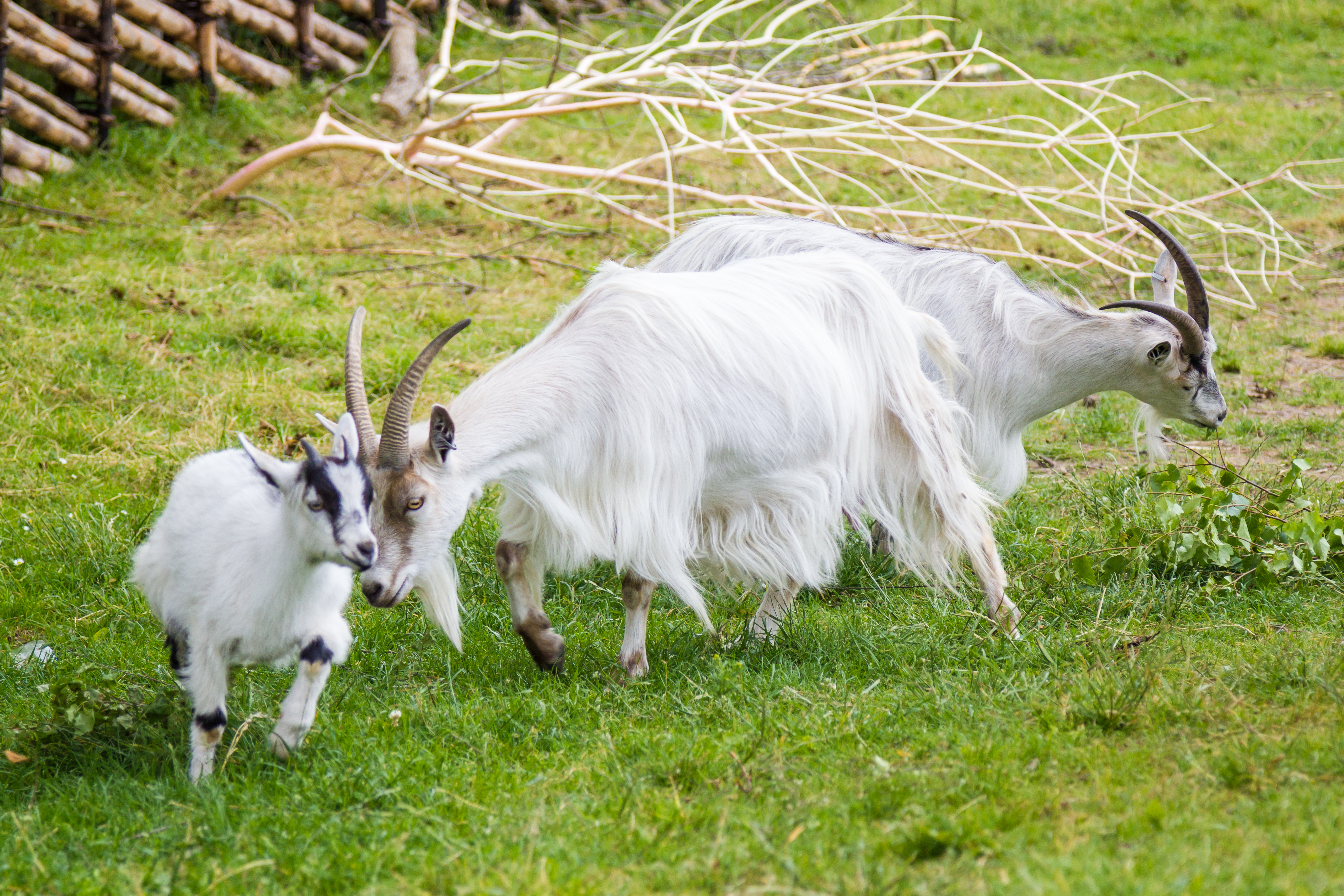 Jämtgetter i Skånes djurpark, Höörs kommun, Skåne län, Sverige